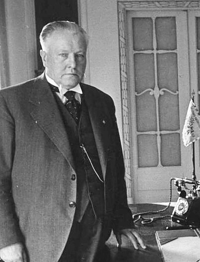 Général et homme d'État letton Jānis Balodis (1881-1965). Photo prise en 1938, lors de la visite du Ministre des Affaires Étrangères de Pologne en Lettonie.